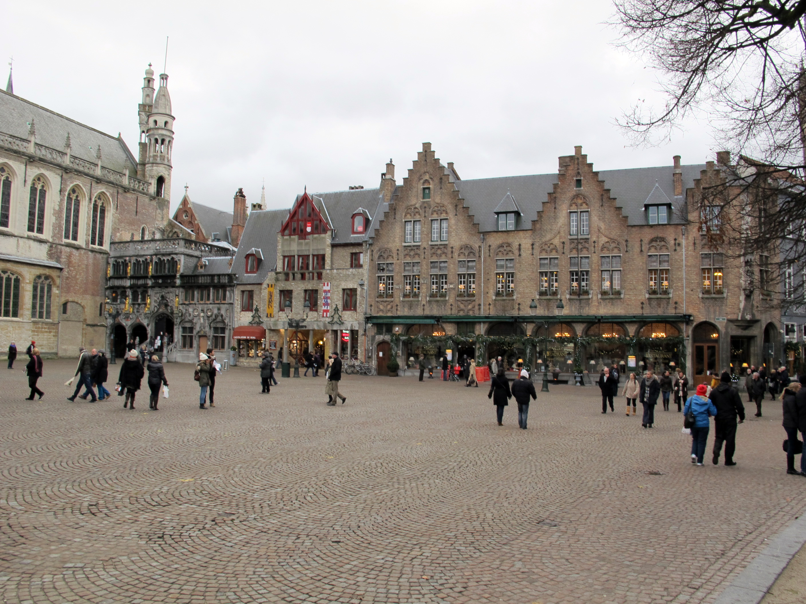 Bruges, burg